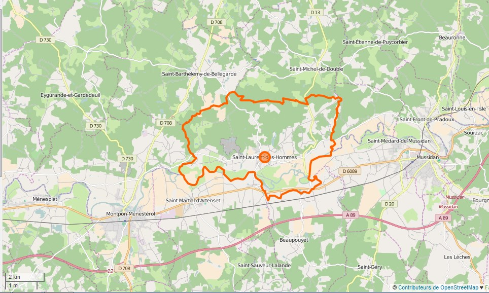 Saint-Laurent-des-Hommes Limite communale This map may be incomplete, and may contain errors. Don't rely solely on it for navigation.